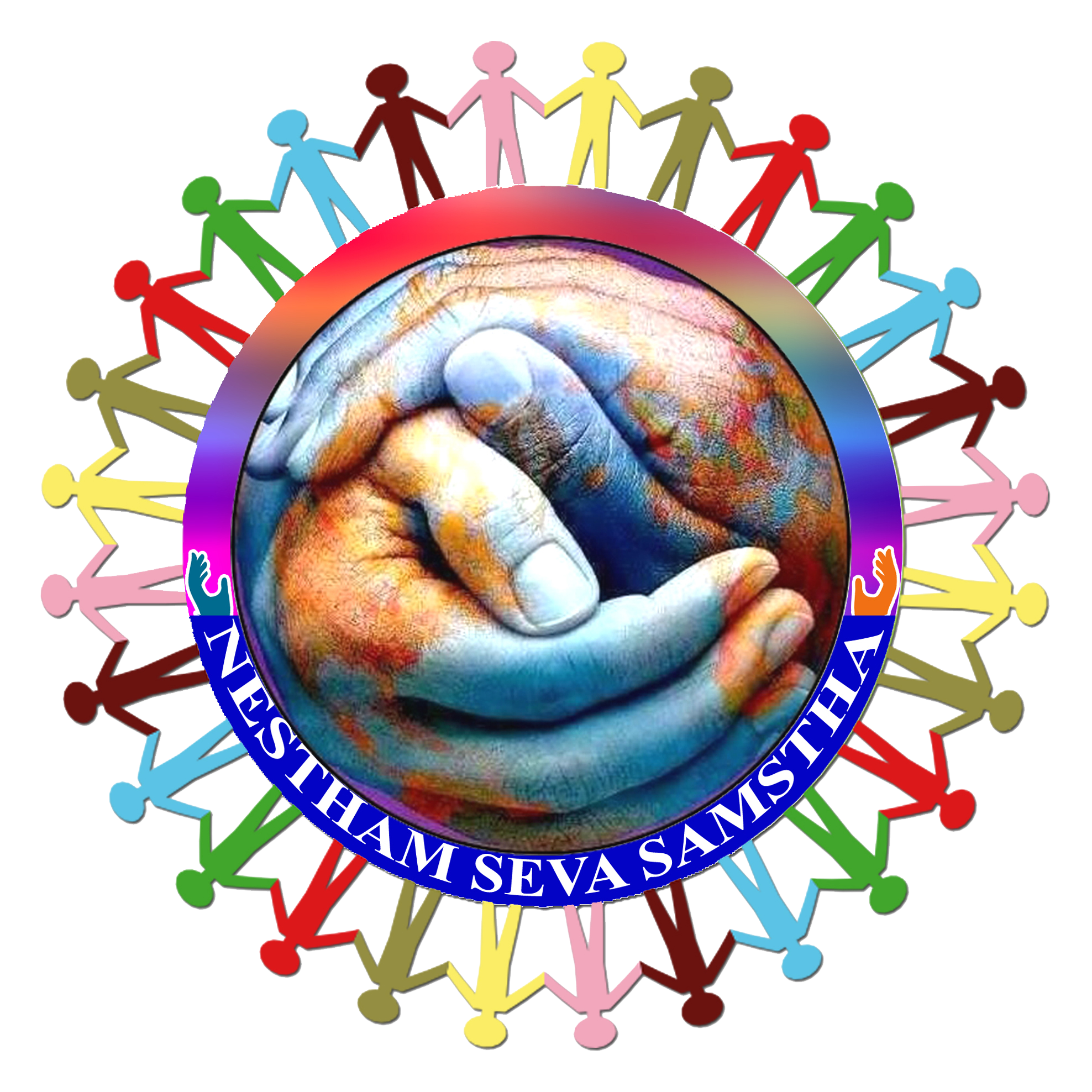 Date work was created or first published